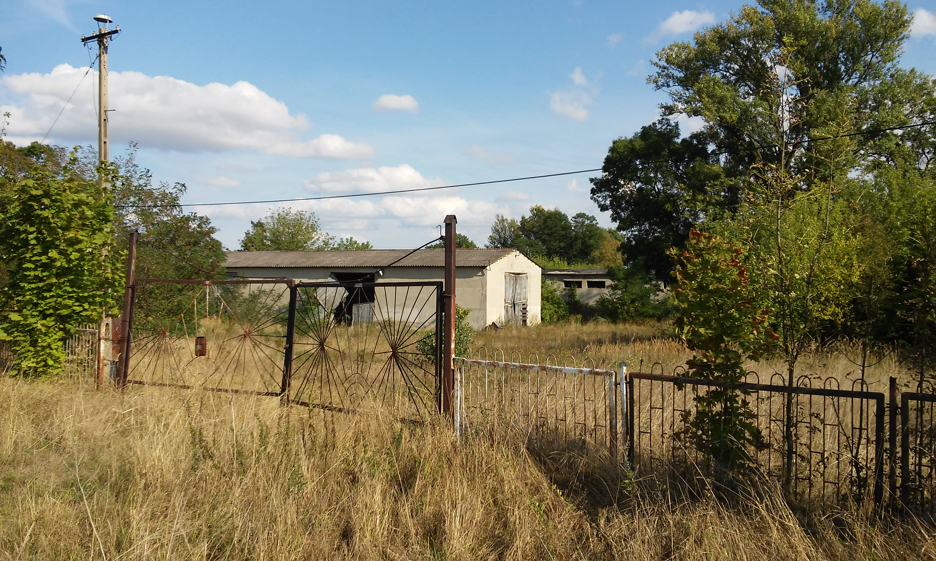 Brzeziny